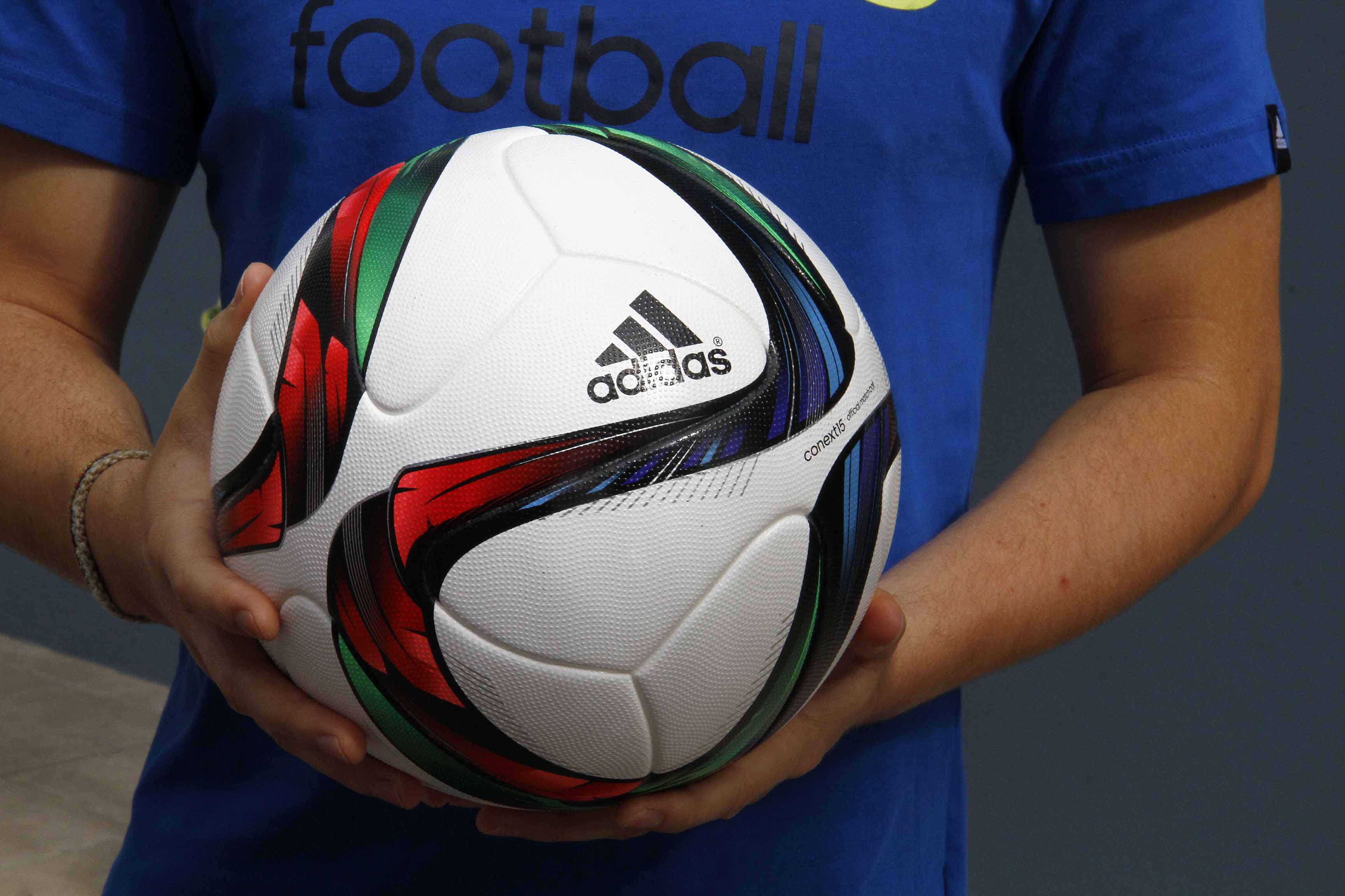 Quito, Ecuador, 29 ene (ANDES).- Adidas presentó el Balón oficial del Campeonato Nacional de Fútbol llamado Conext 15 . Foto: Micaela Ayala V./ANDES